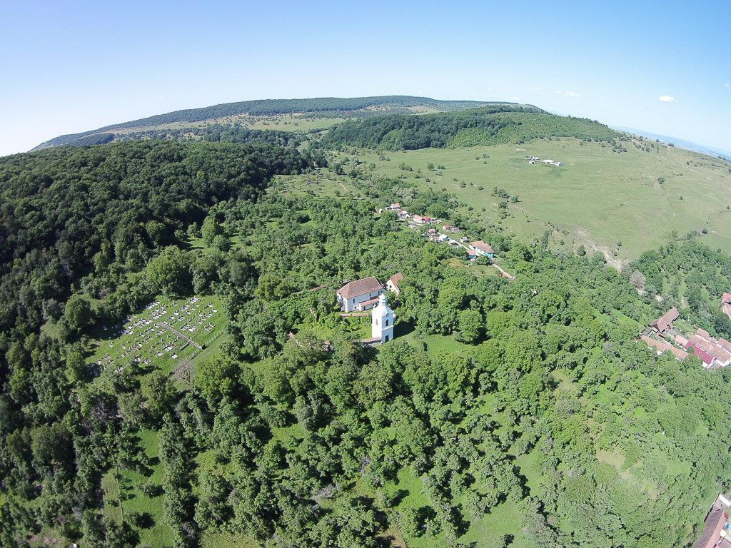 Biserica Evanghelica fortificata Fiser (judetul Brasov) - vedere aeriana